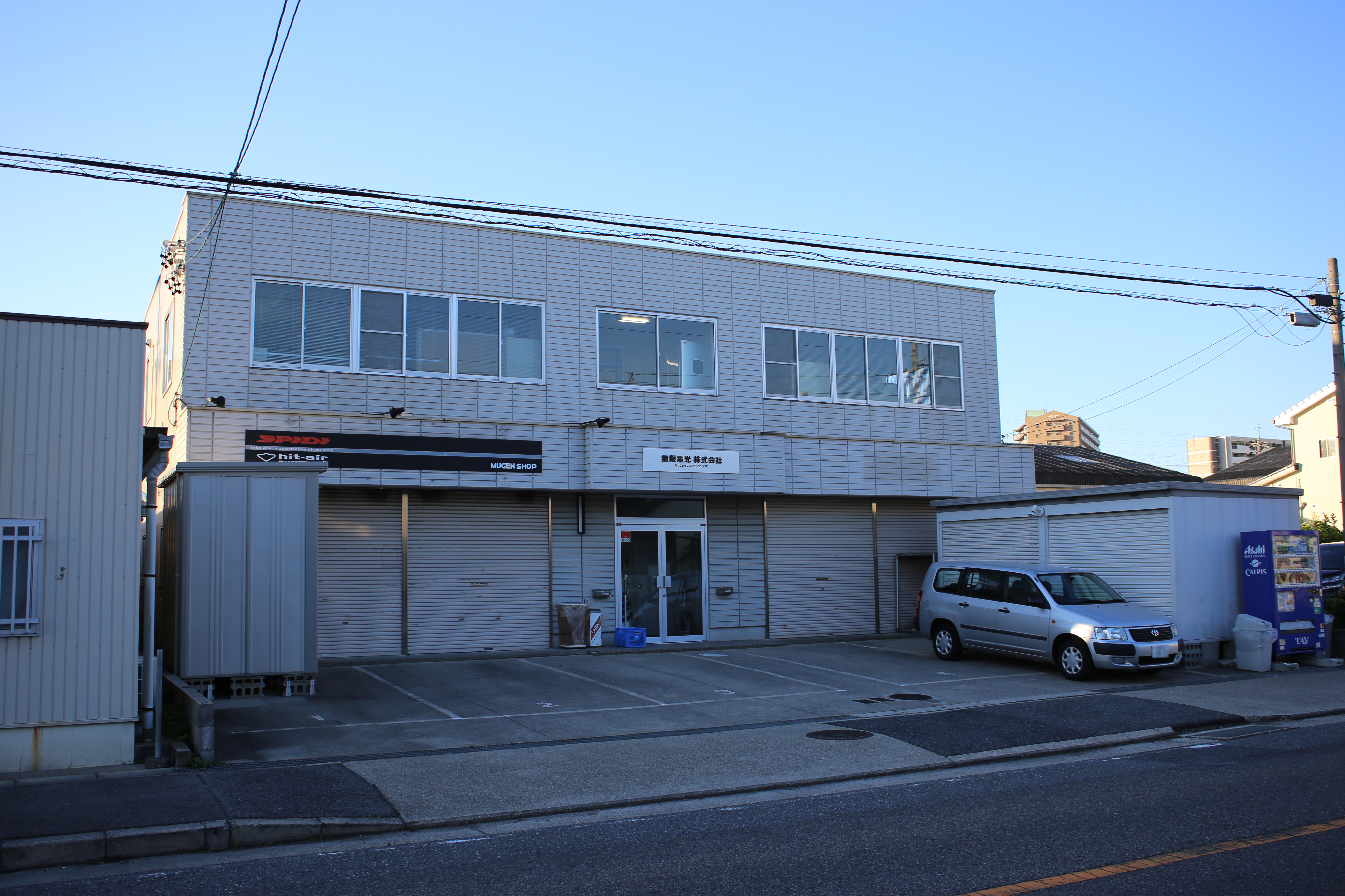 名古屋市天白区池場の無限電光本社を南側公道西側より撮影。ただし、ナンバープレートにつき画像処理済。